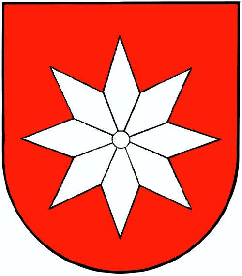 Balninkų herbas